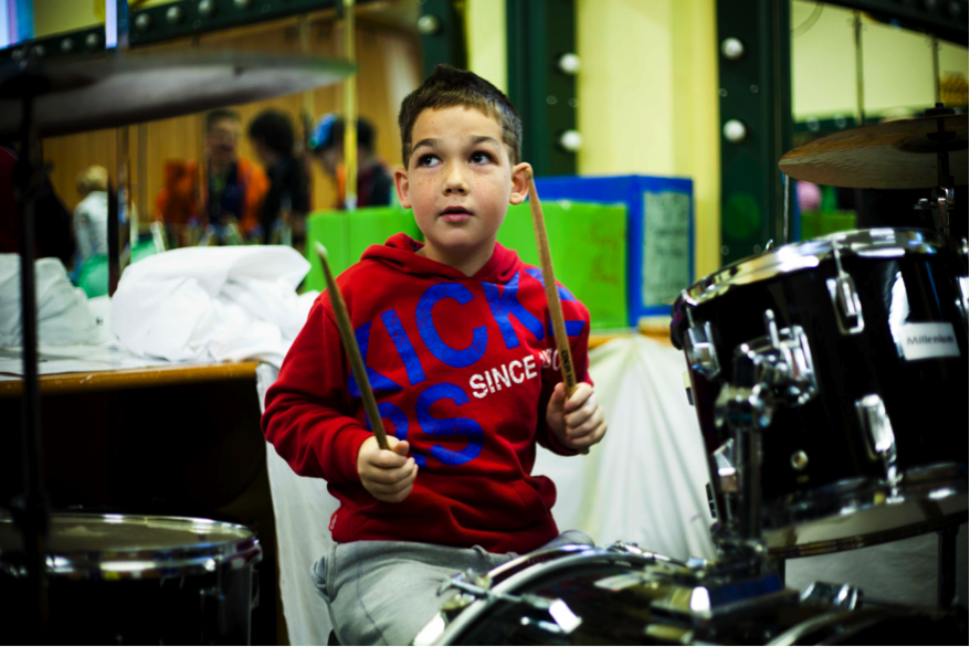 Barretstown